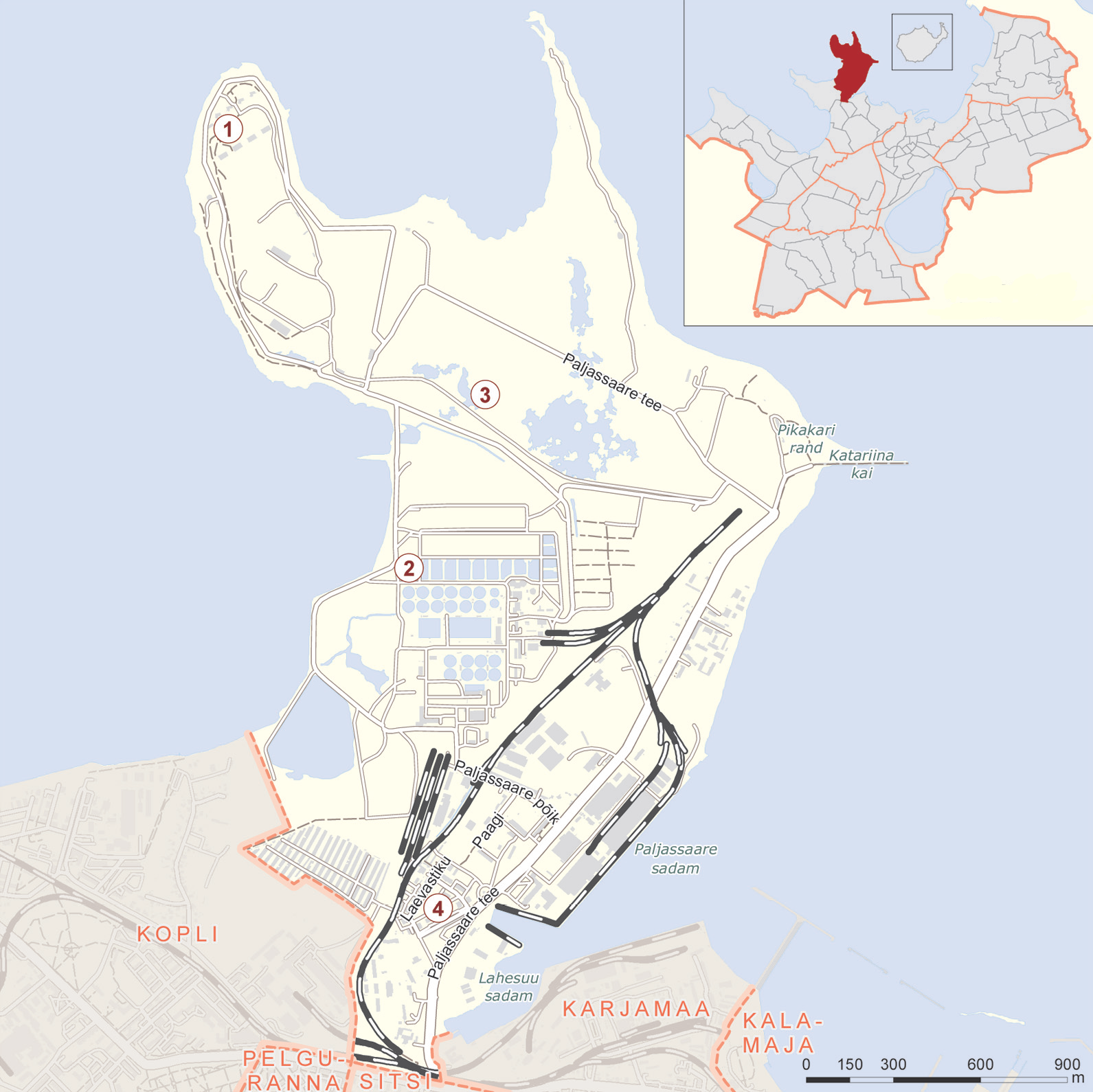 Paljassaare asumi kaart